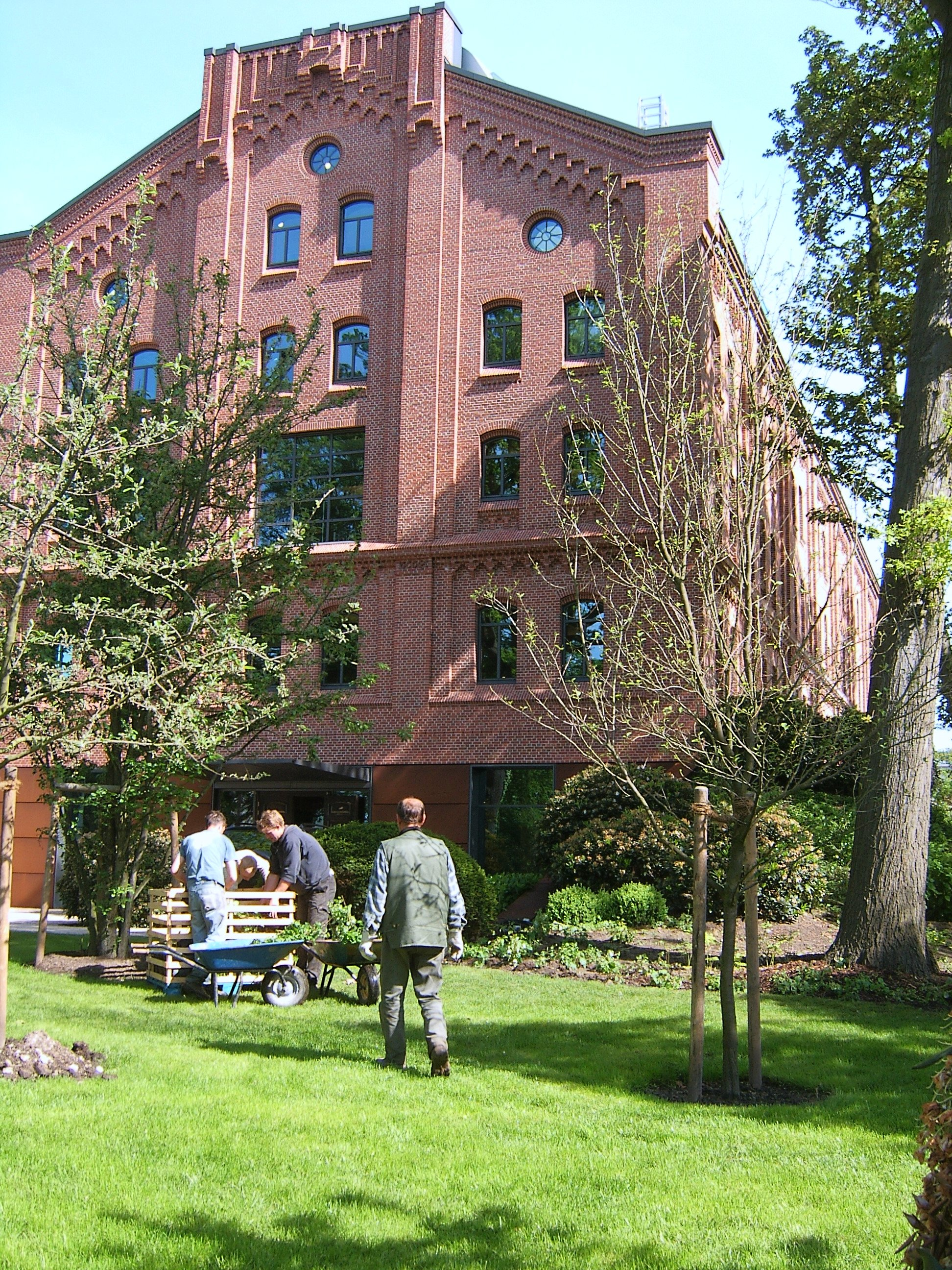 Hamburg, Elbchaussee, ehemalige "Elbschloss-Brauerei"